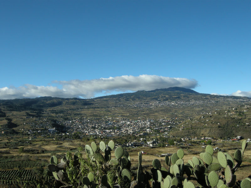 Panorámica de los límites de San Pedro Atocpan con el estado de Morelos.